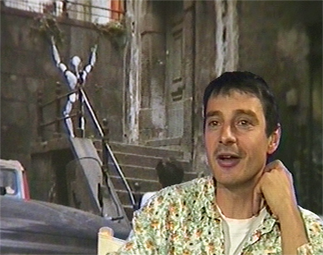 Portrait de Jérôme Mesnager